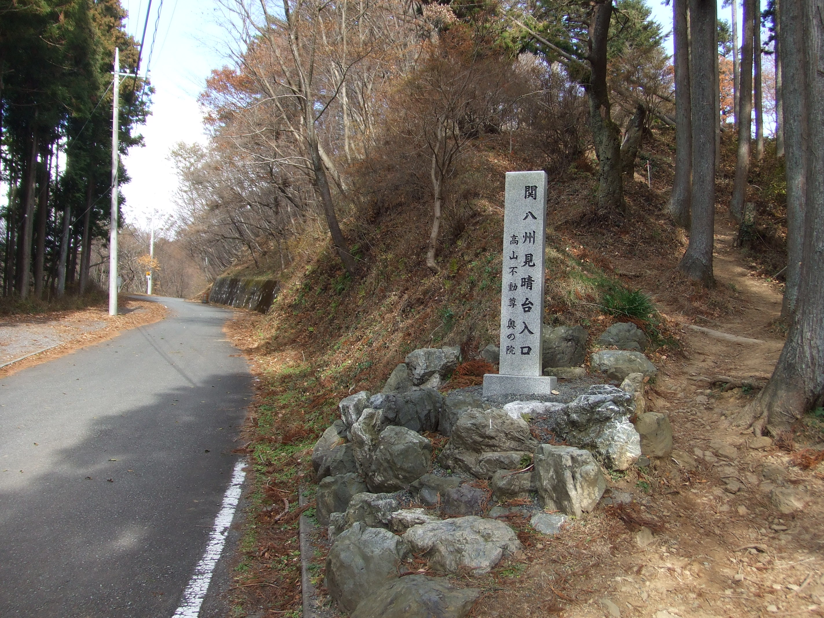 埼玉県飯能市と越生町の境界にある関八州見晴台の入口。左の道は奥武蔵グリーンライン。